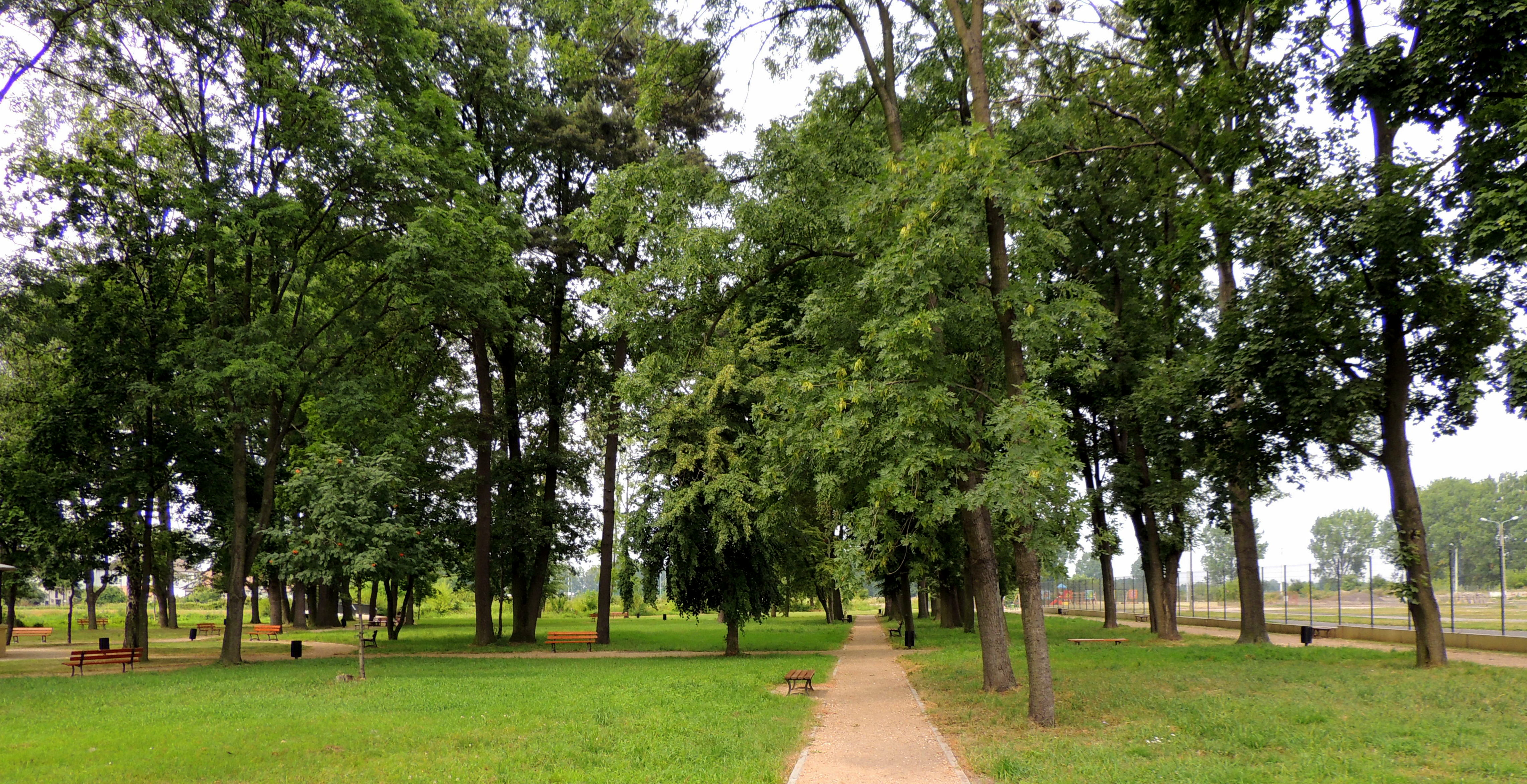 Piątek - park miejski, poł. XIX